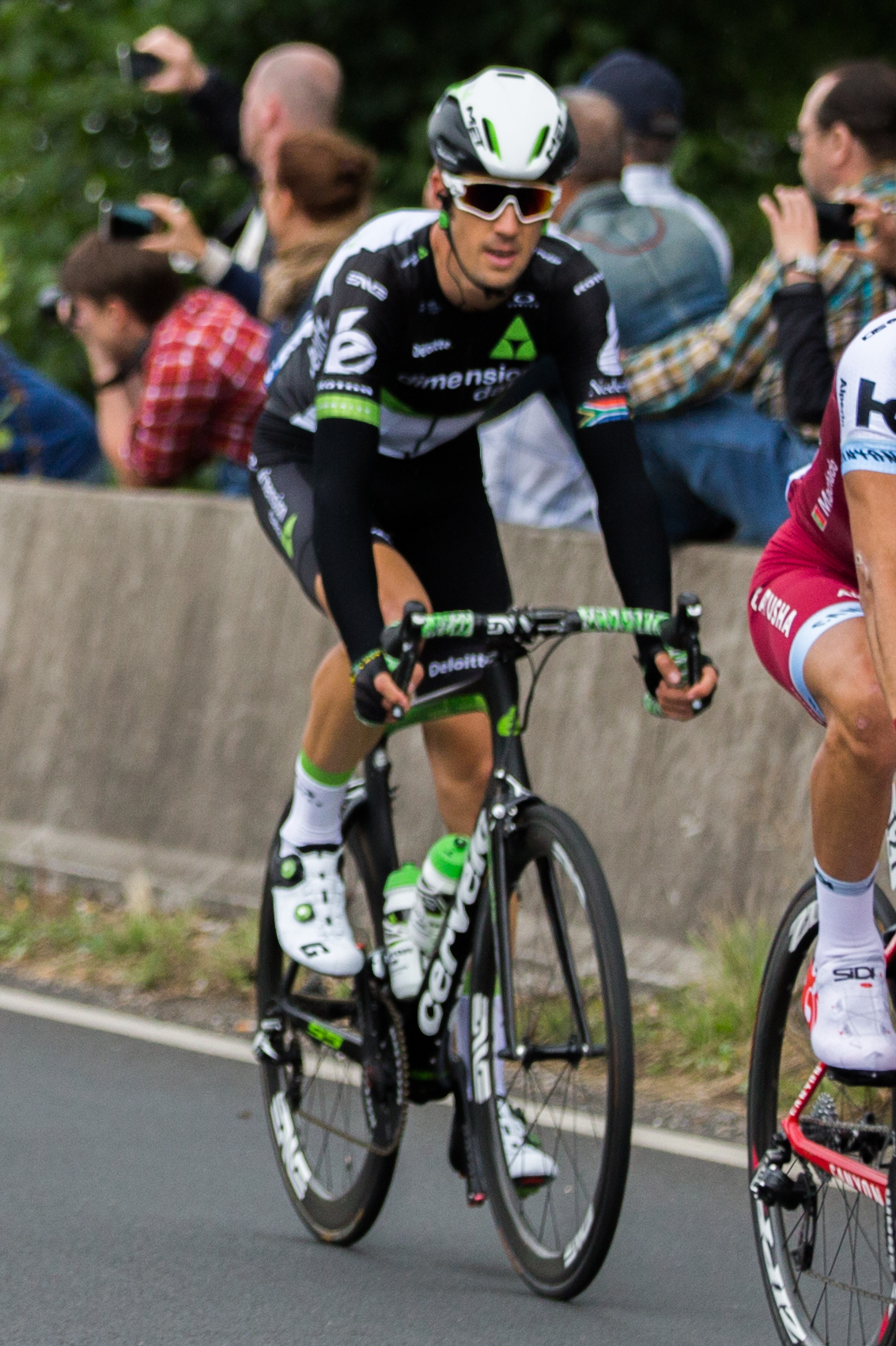 Die zweite Etappe der Tour de France 2017 durch Neuss